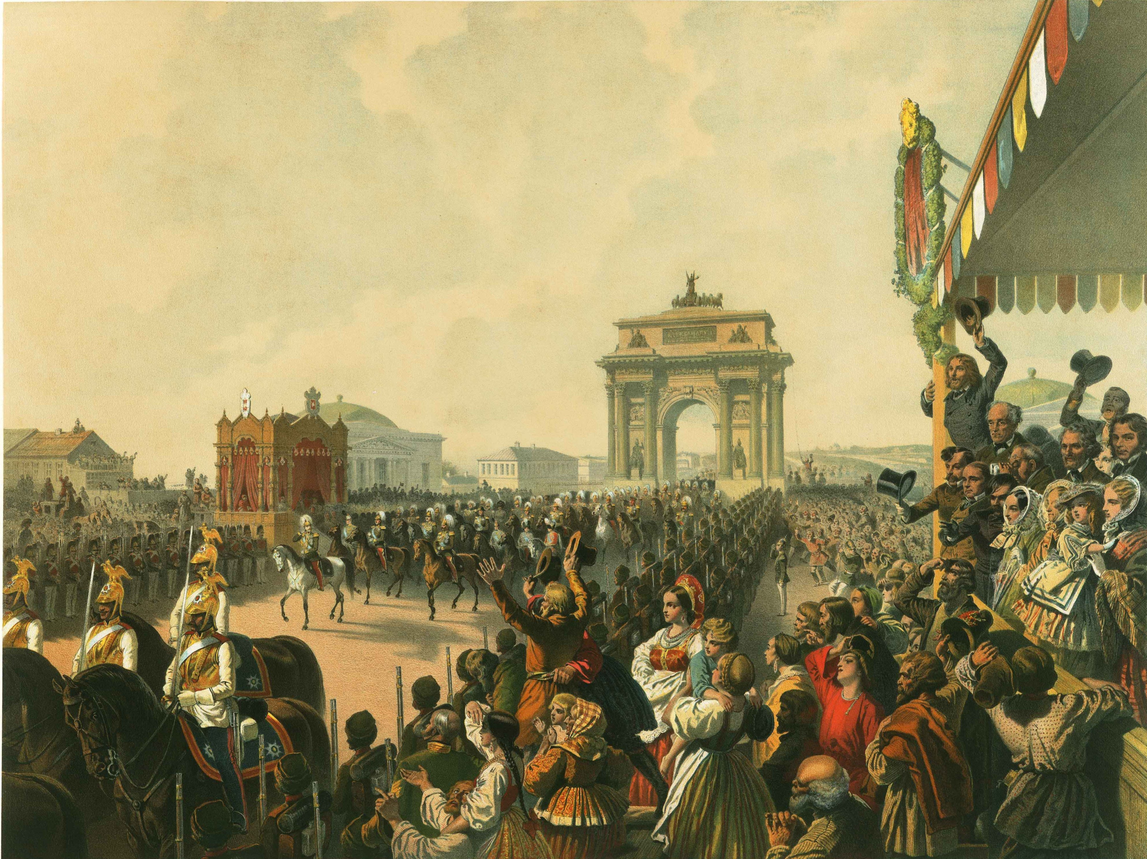 Tsars Entry into Moskau / Triumphaler Einzug Ihrer Majestäten in Moskau (Chromolithographie)